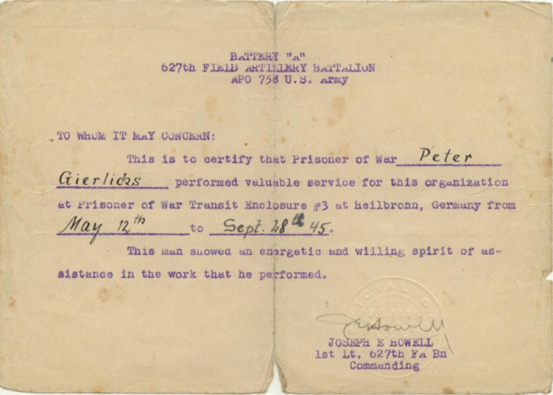 Entlassungsschein aus dem US-Kriegsgefangenenlager PWTE C-3 in Heilbronn-Böckingen